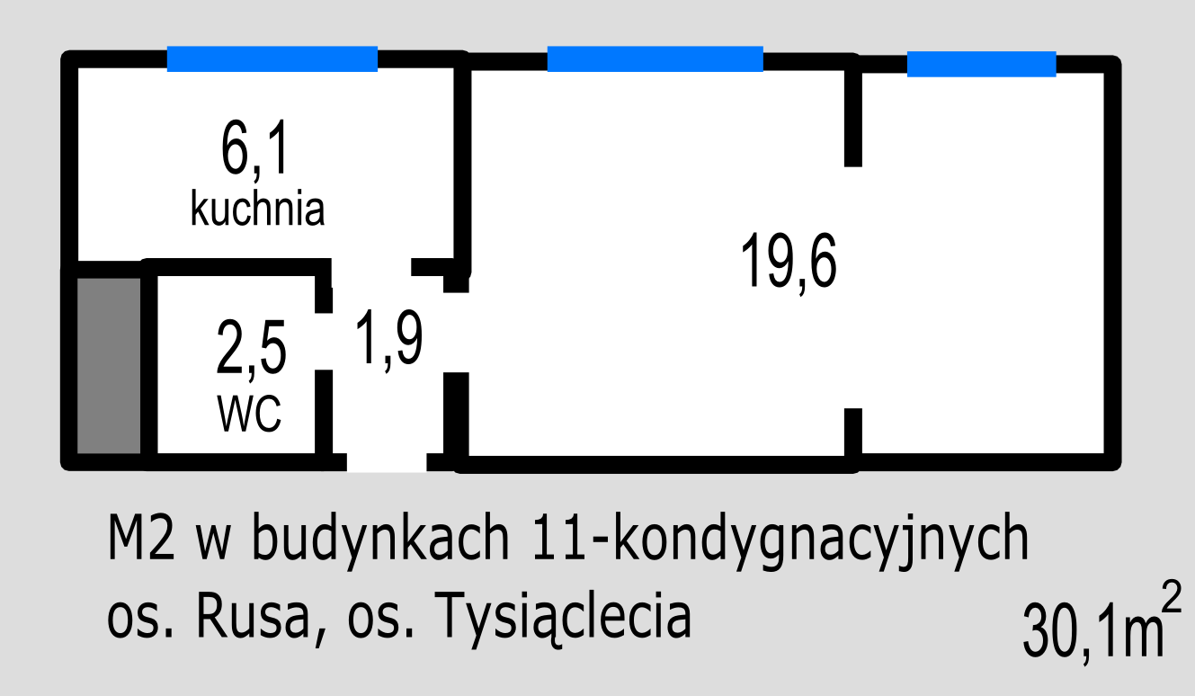 Mieszkanie M2 według normatywu docelowego w budynkach 11-kond. na os. Rusa i Tysiąclecia